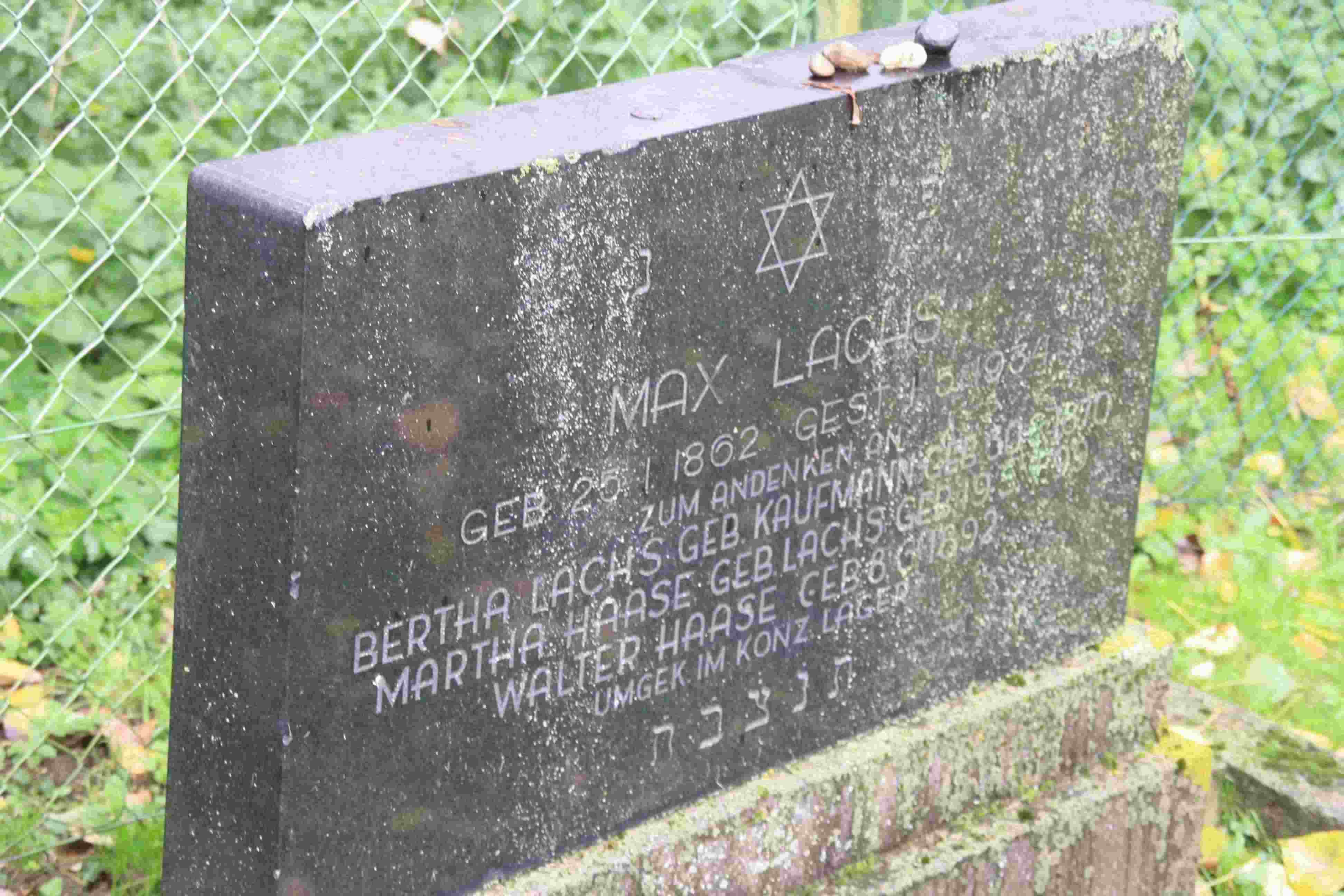 Der jüdische Friedhof bei Lüxheim, Kreis Düren